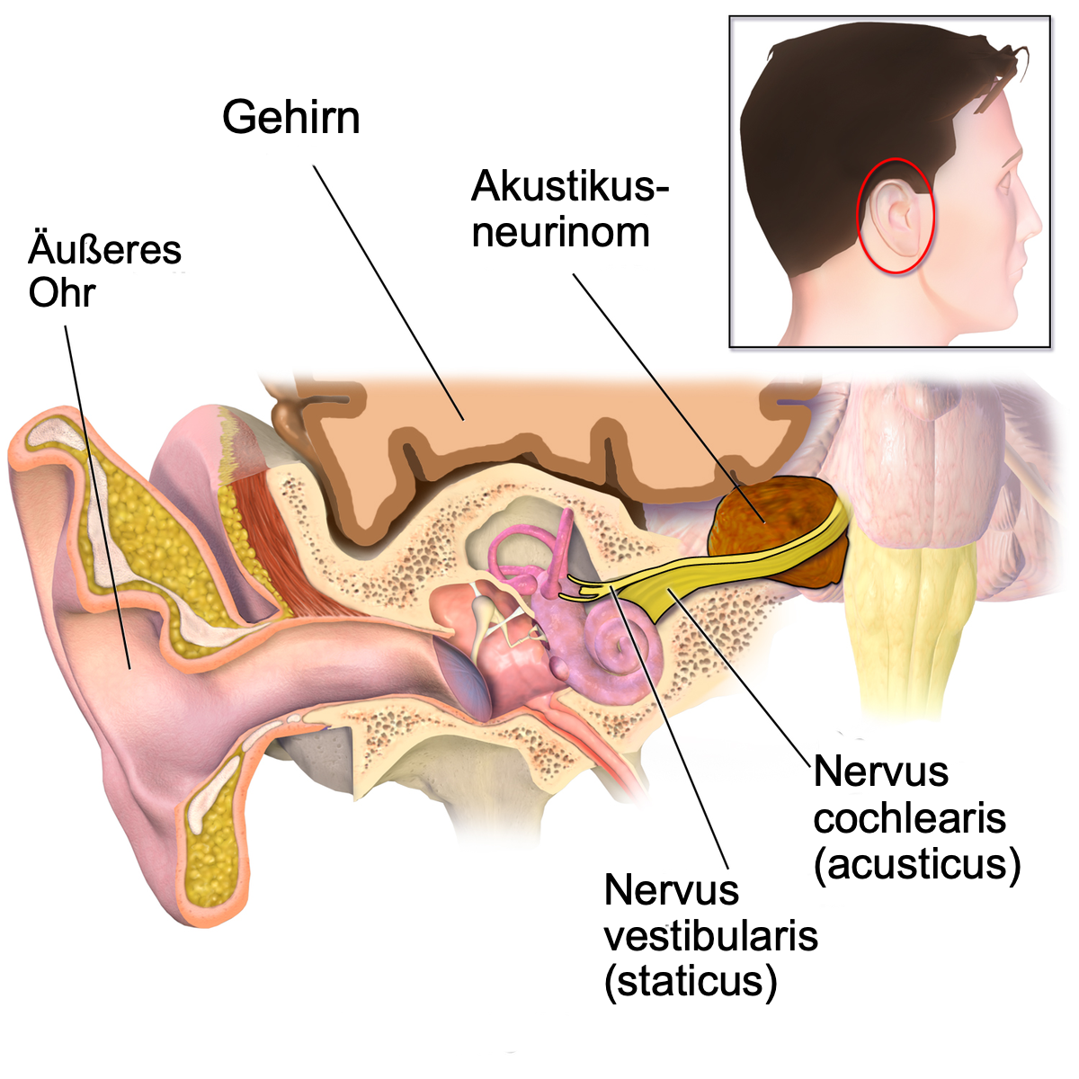 anatomische Darstellung des Akustikusneurinoms